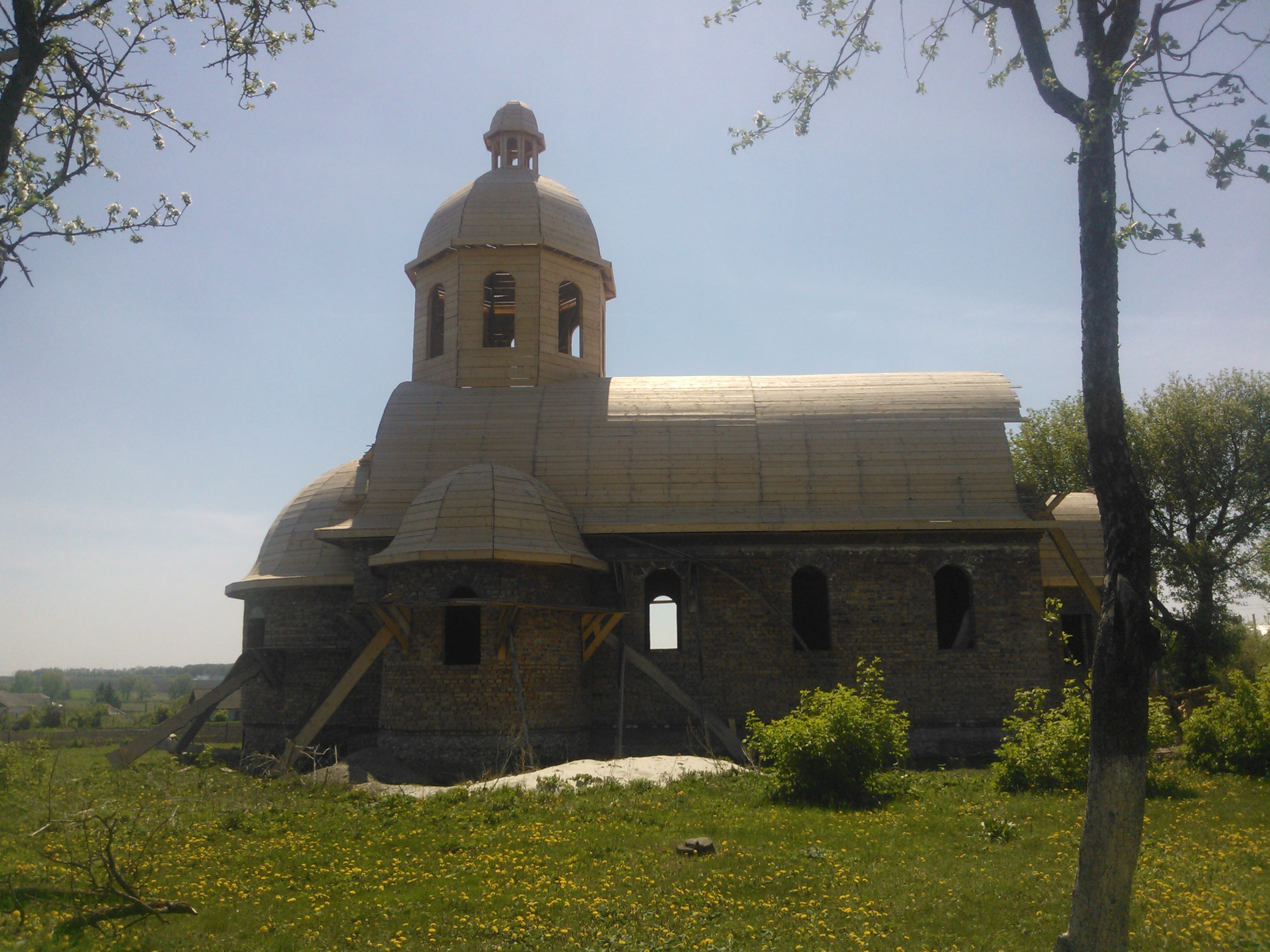 с. Бальківці Волочиського району Хмельницької області